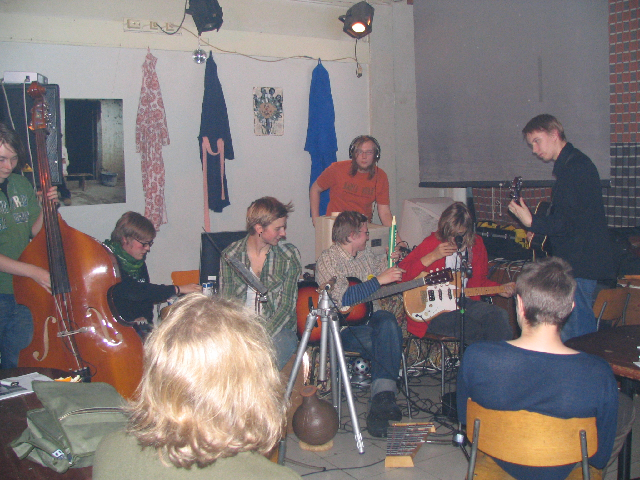 Hear Radio Day 2 in Vakiopaine, Jyväskylä